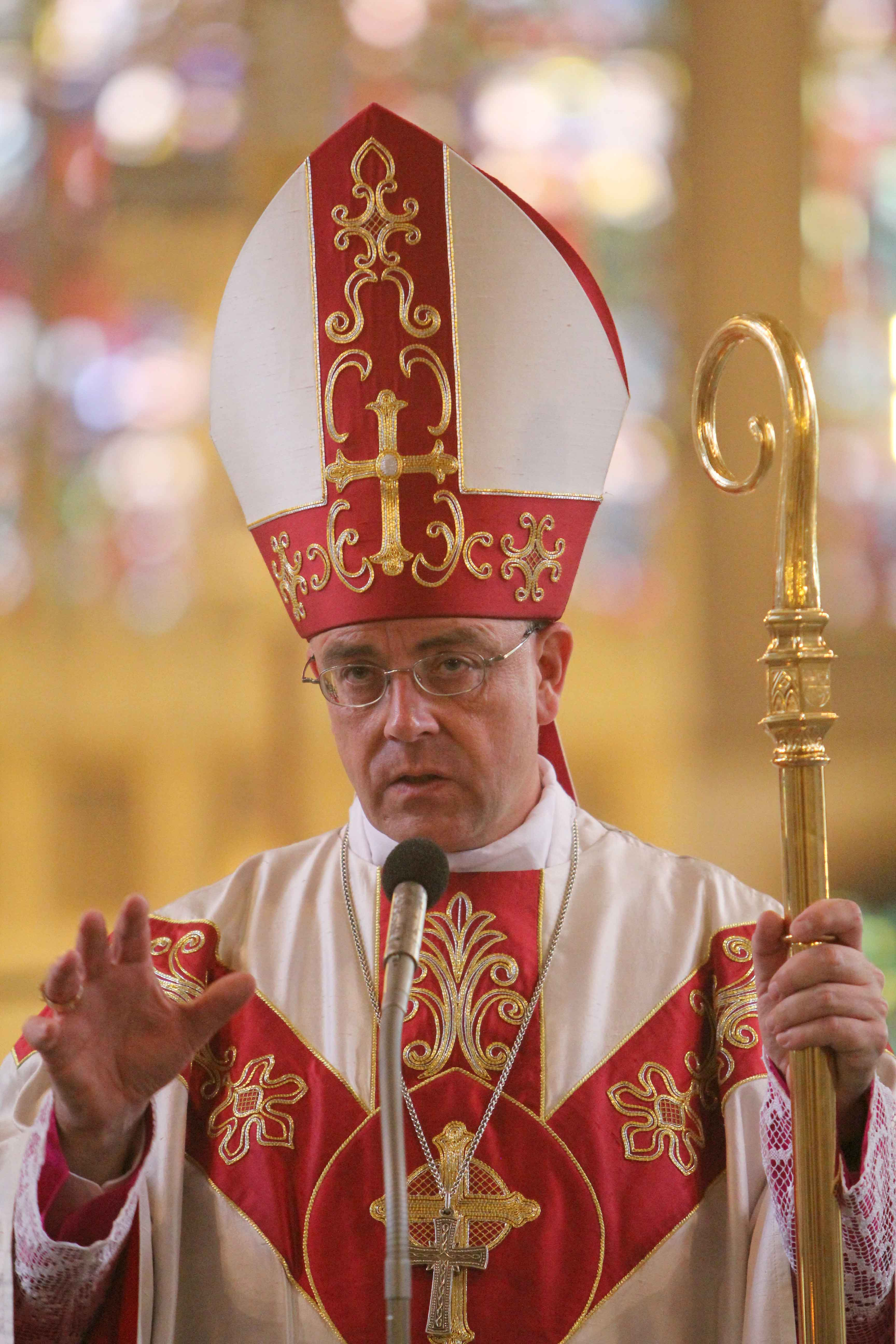 Weihbischof Matthias Koenig, Paderborn - Gottesdienst im Hohen Dom zu Paderborn am 29.5.2010